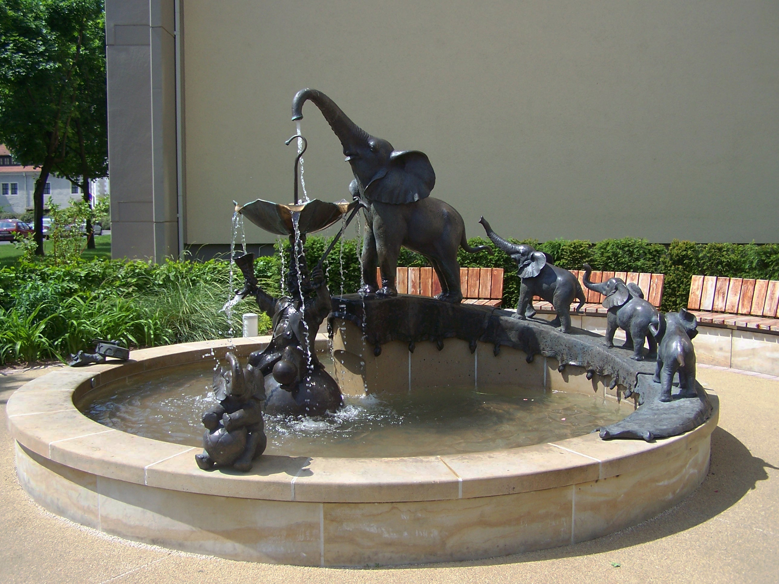 Sarrasani-Brunnen am Carolaplatz in Dresden, an der Stelle des im Zweiten Weltkrieg zerstörten Zirkusgebäudes